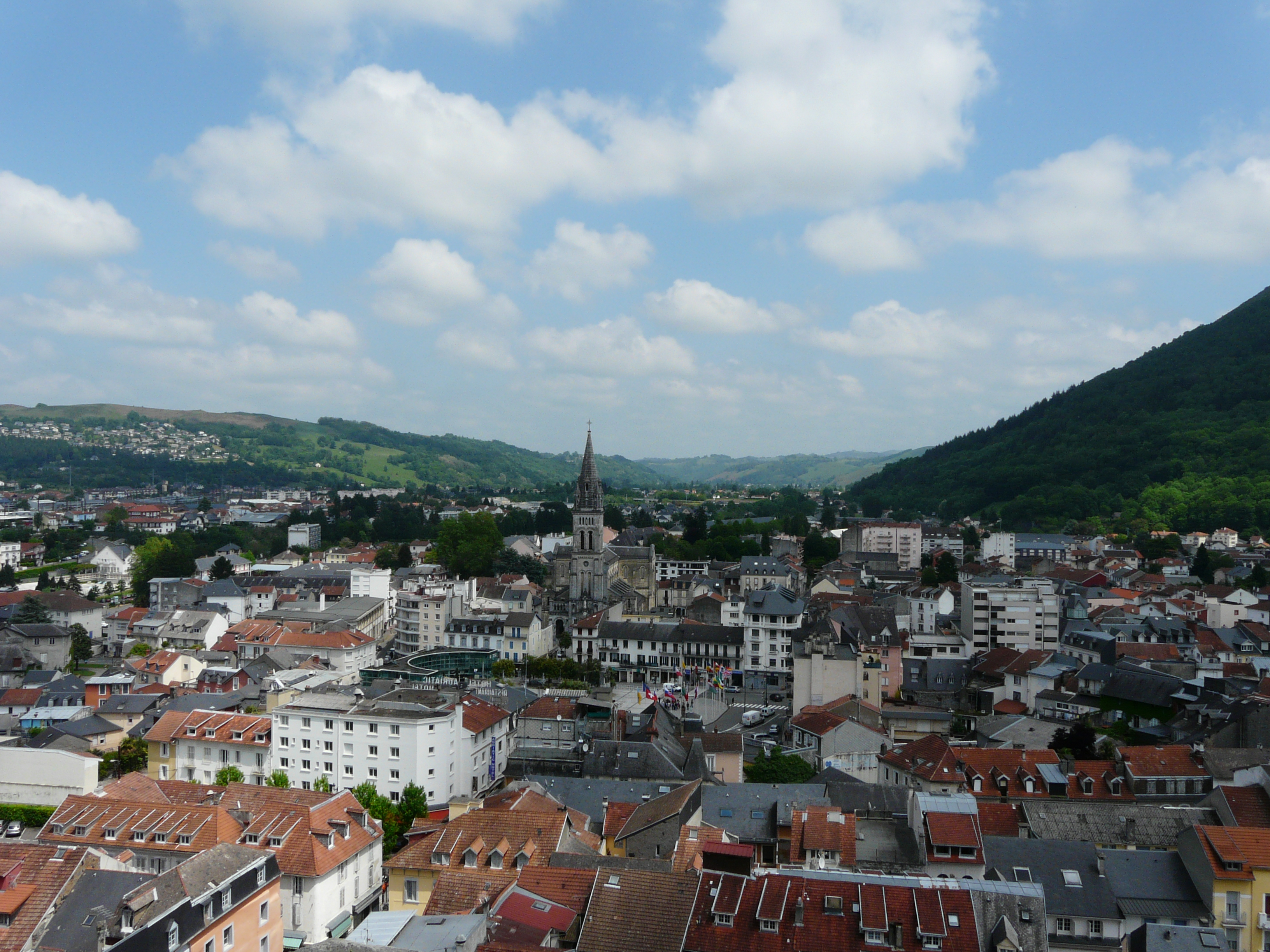 La ville de Lourdes et son église du Sacré-Cœur vues depuis le château, Hautes-Pyrénées, France.